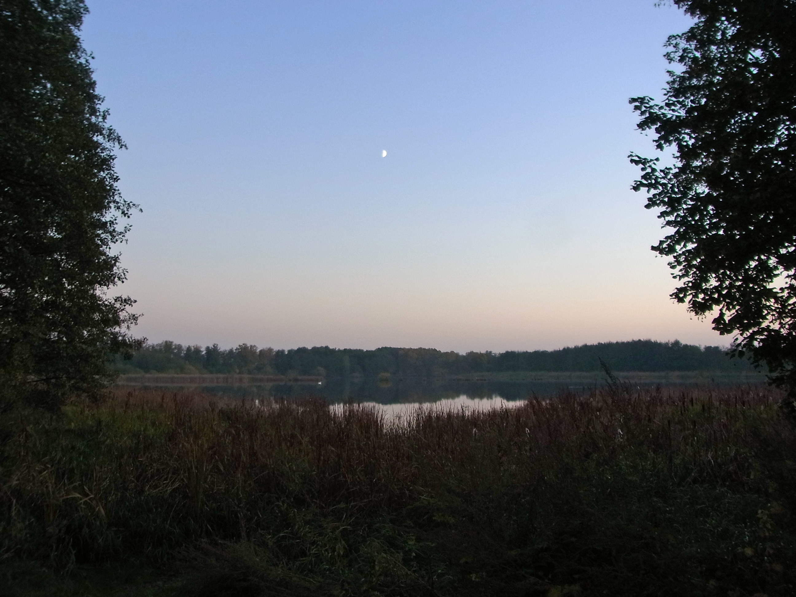 Herbstliche Abendstimmung im NSG Viehmoor bei Leiferde, Landkreis Gifhorn